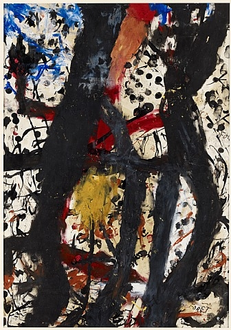 картины швейцарского живописца и графика Луи Суттера (фр. Louis Soutter, 1871 — 1942)